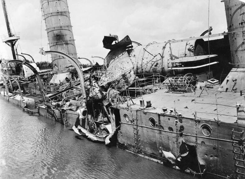 Kreuzer Königsberg zerschossen Information added by Wikimedia users.